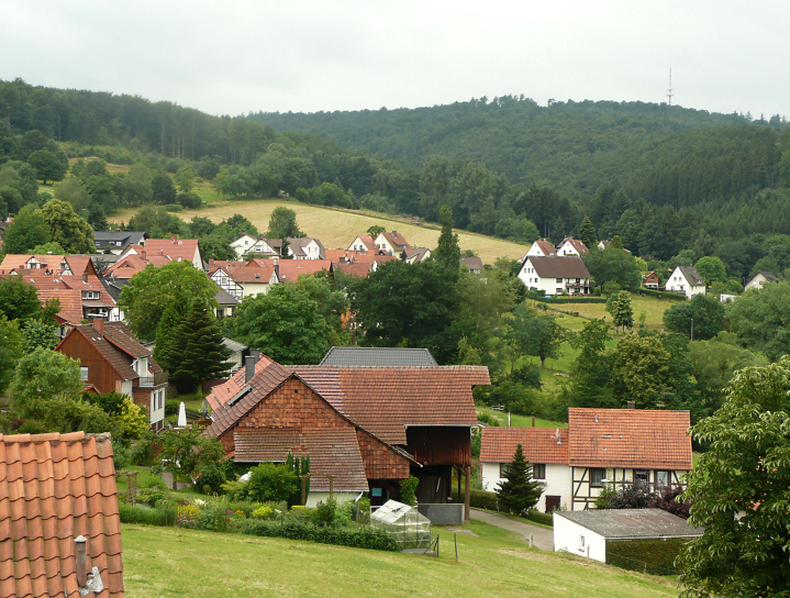 Laubach